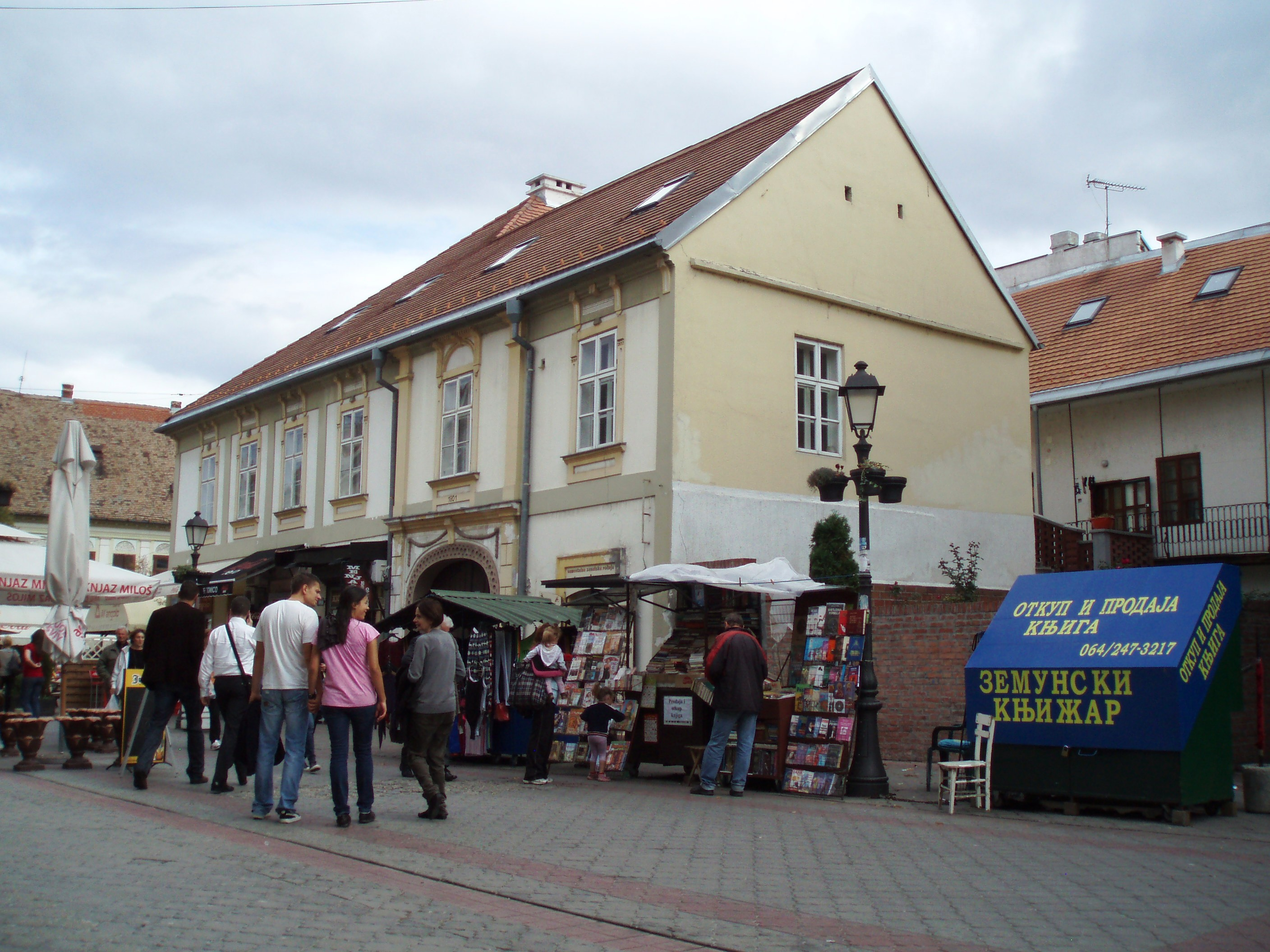 Kuća porodice Marković u Zemunu, autor fotografije: Nicolo